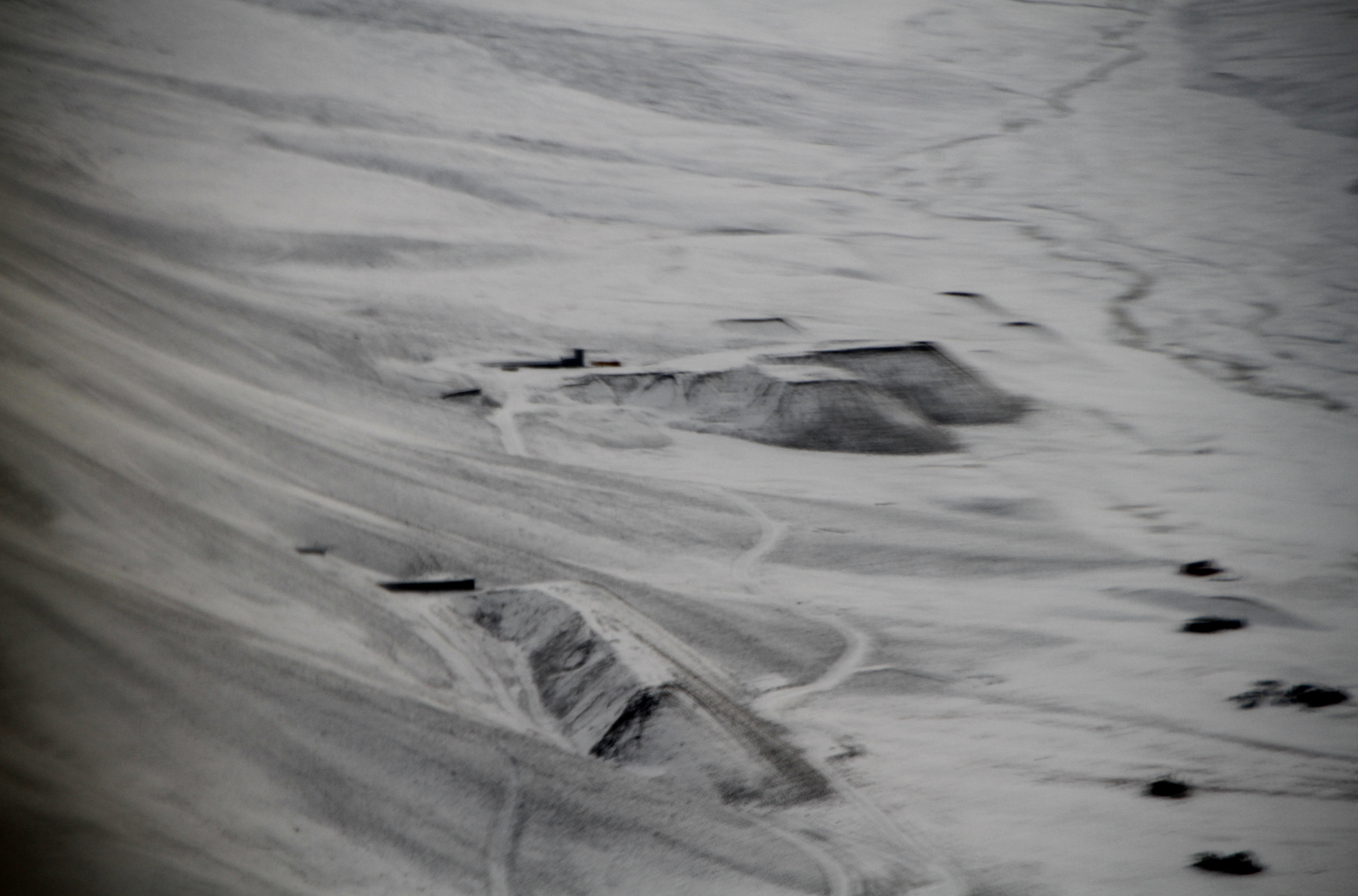 Old mine facilities in Plataaberget / Gruve 3, longyearbyen, Spitsbergen (Norway)